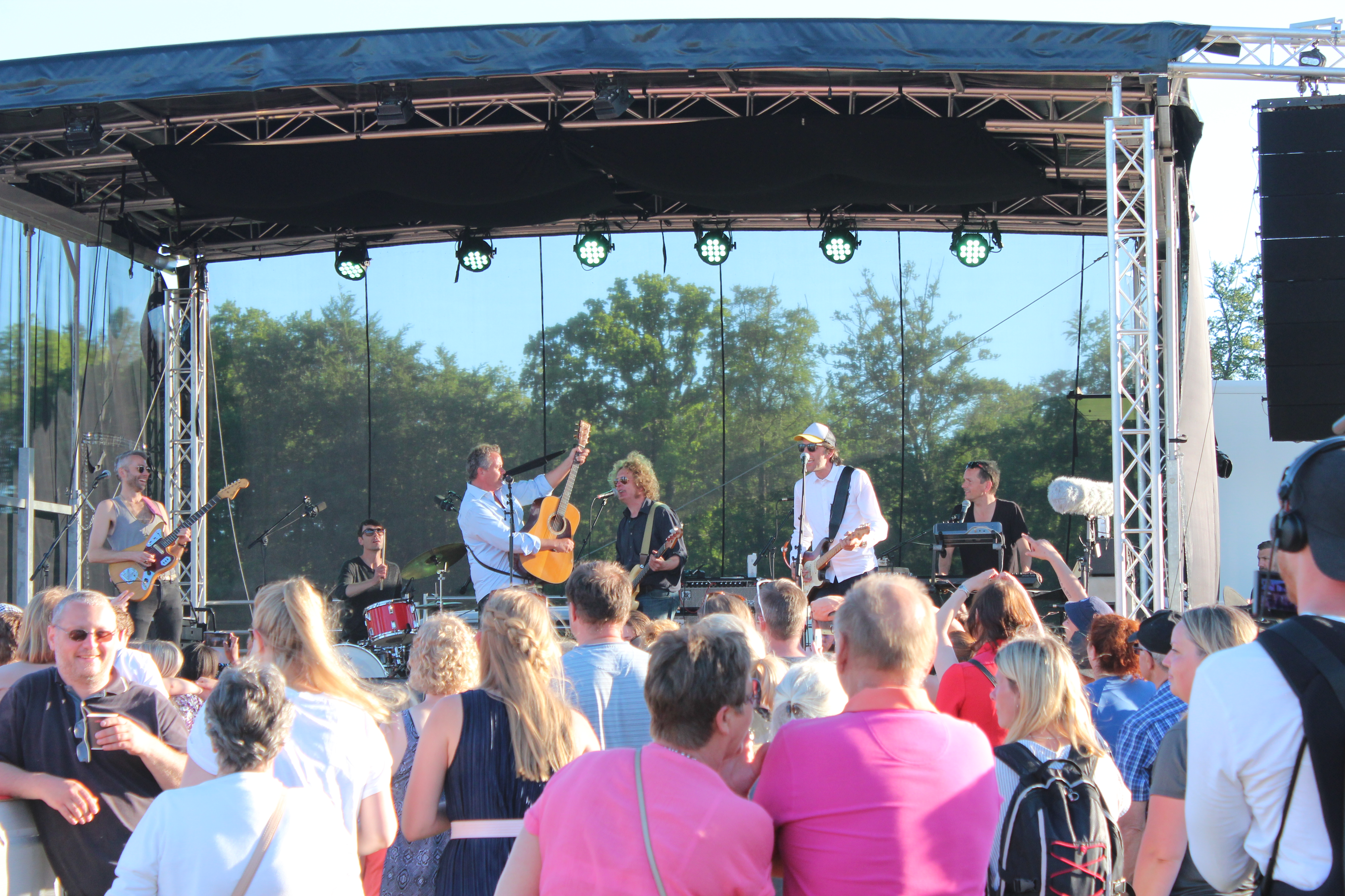 Rasmus Nøhr under Danmark Dejligst på Middelaldercentret d. 27. maj 2017.